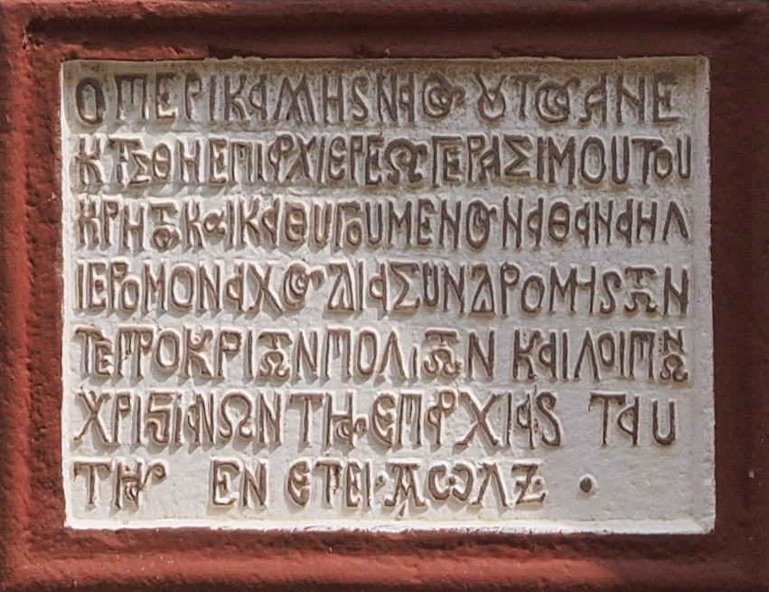 Српски (ћирилица): Манастир Буково (Битољ) надпис на грчком алфабету, Македонија